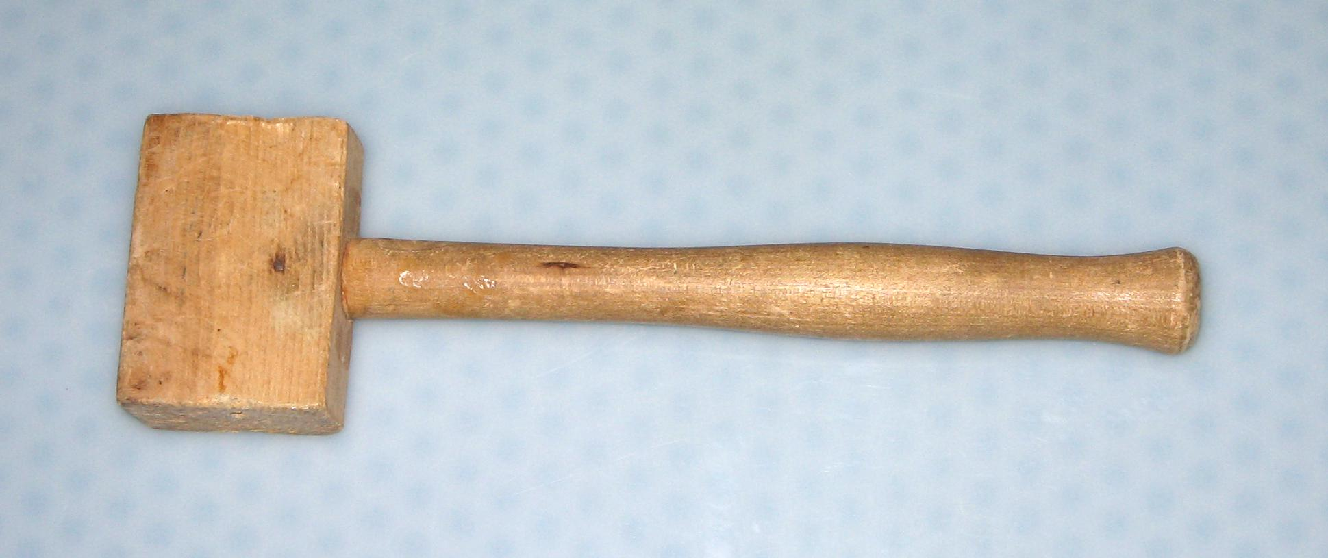 Ligna maleo. La foto estis farita de mi mem.